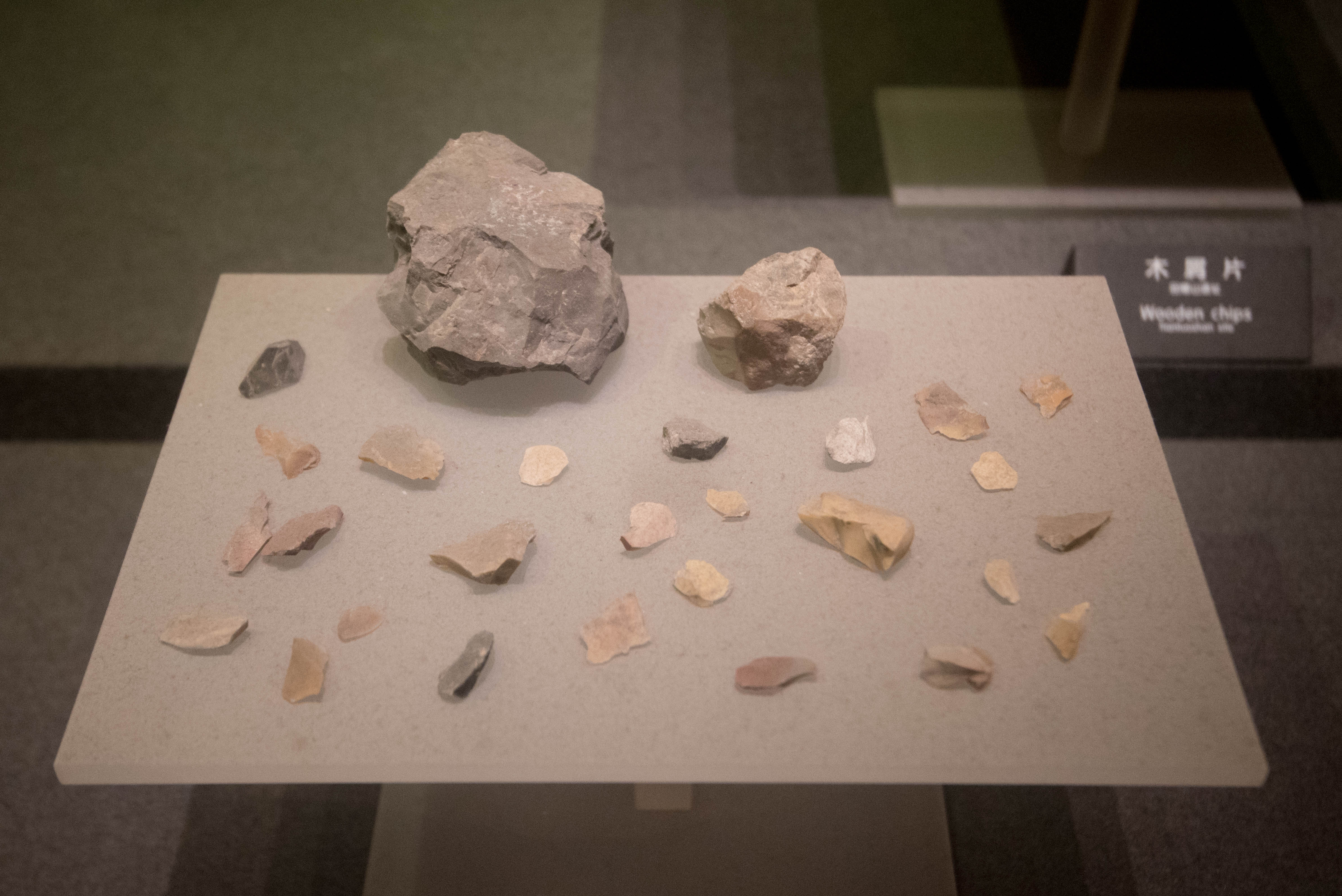 鲻山遗址出土石片、石核